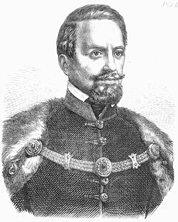 báró Sina Simon (1810–1876) földbirtokos, diplomata és mecénás (Vasárnapi Ujság, 1857. november 29.)